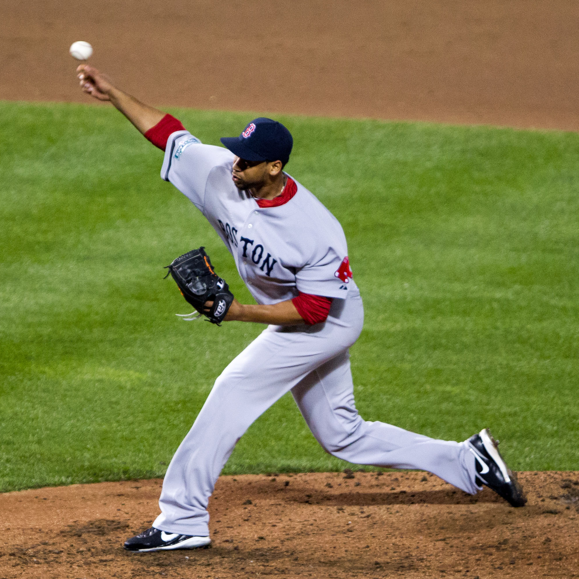 Pedro Beato